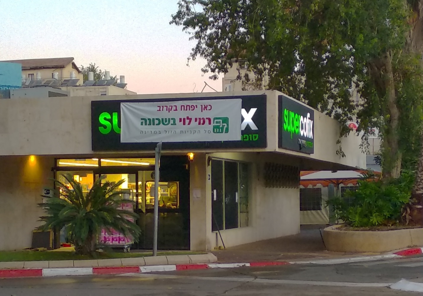 הסבת סניף של סופר קופיקס לרמי לוי